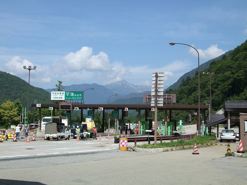 中部縦貫自動車道 安房峠道路 平湯料金所（入口）